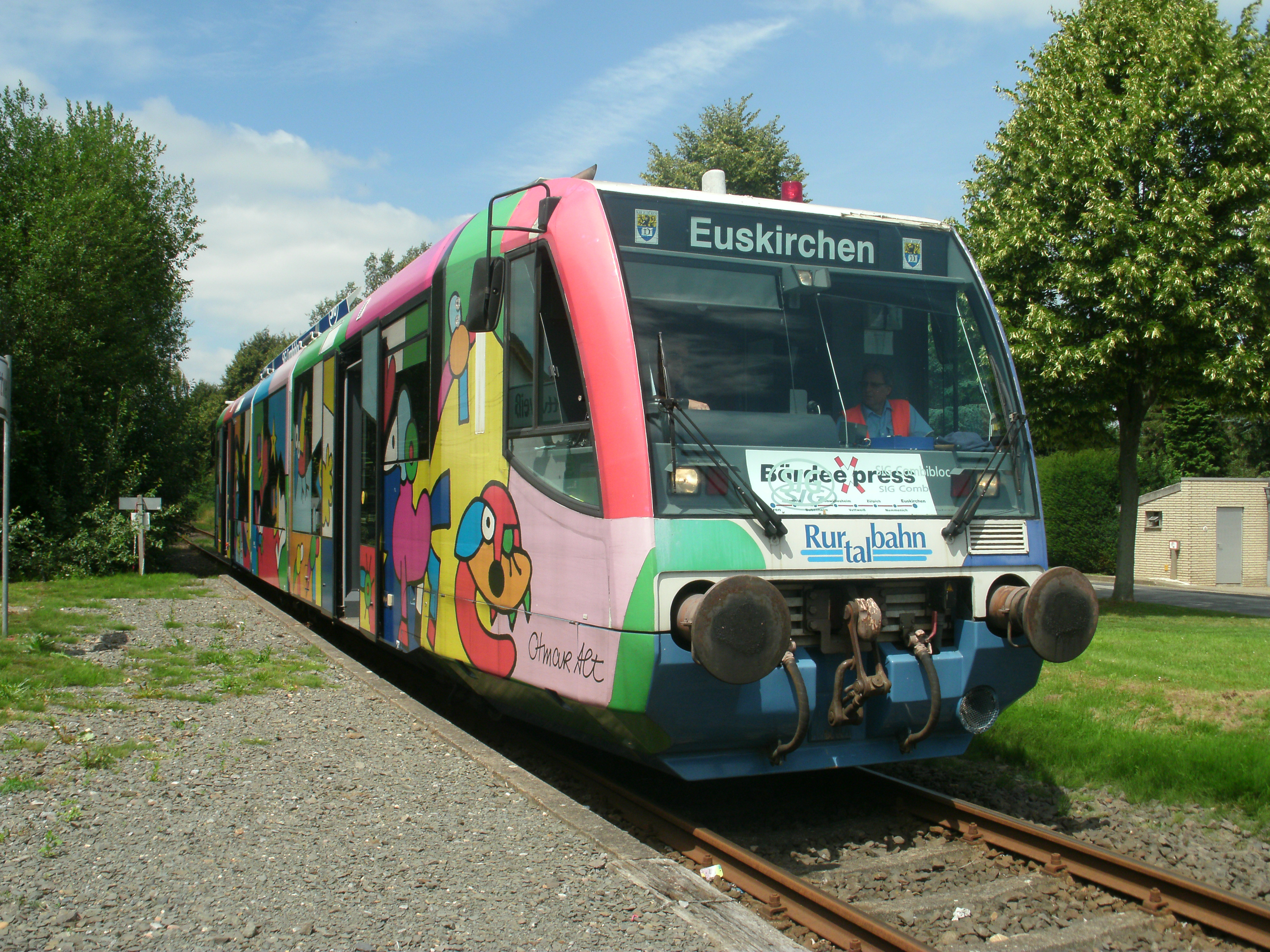 Der ehrenamtlich betriebene Bördeexpress (Bürgerbahn) Düren - Zülpich - Euskirchen beim Zwischenhalt im Haltepunkt Vettweiß